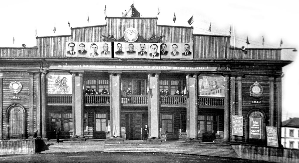 ДК Водник